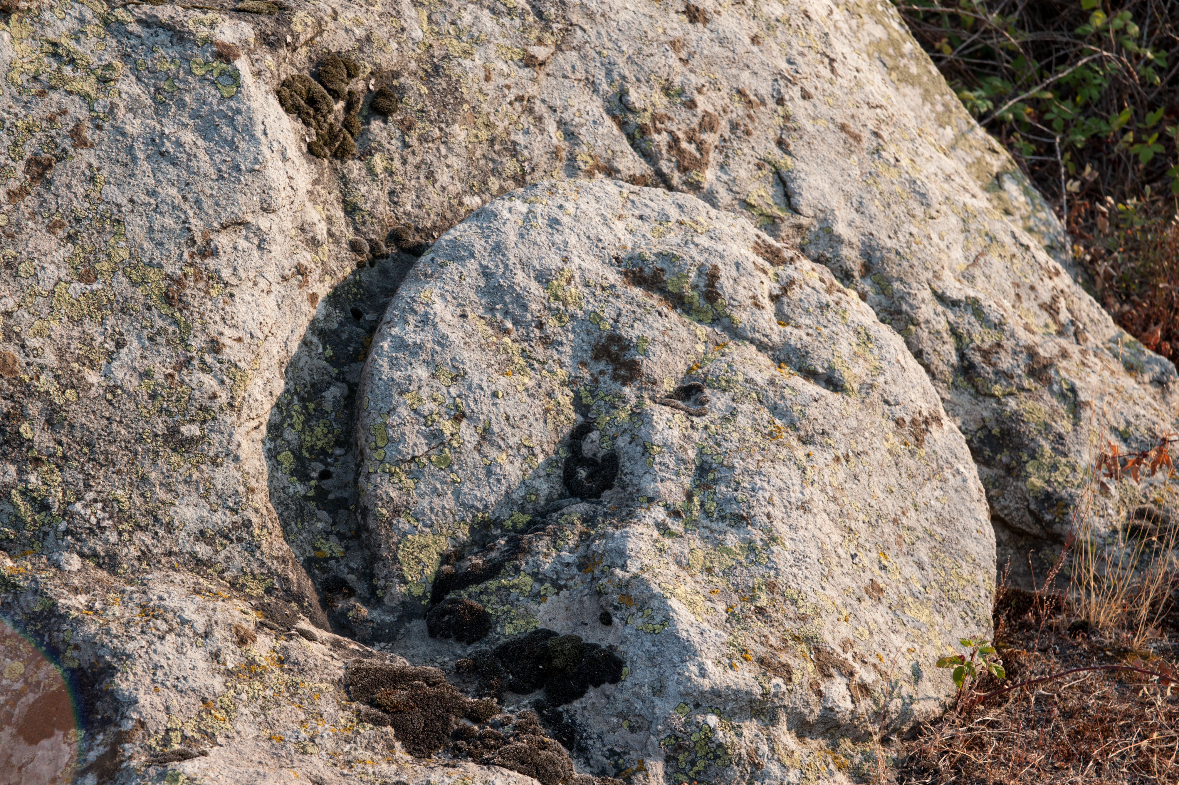 Тракийско светилище Мочукови камъни, м.Дрънчи Дупка, с.Мелница